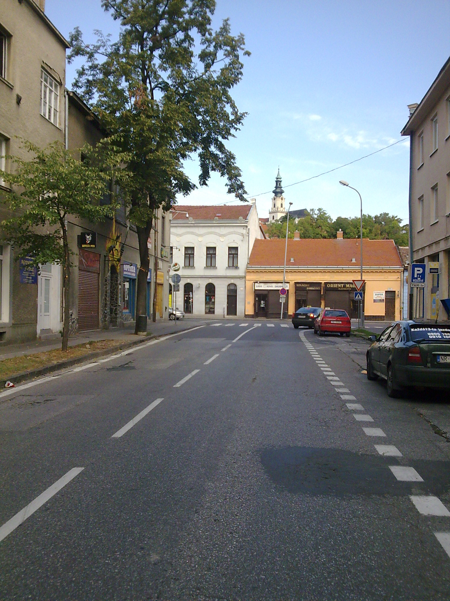 Ulica Kmetkova w Nitrze